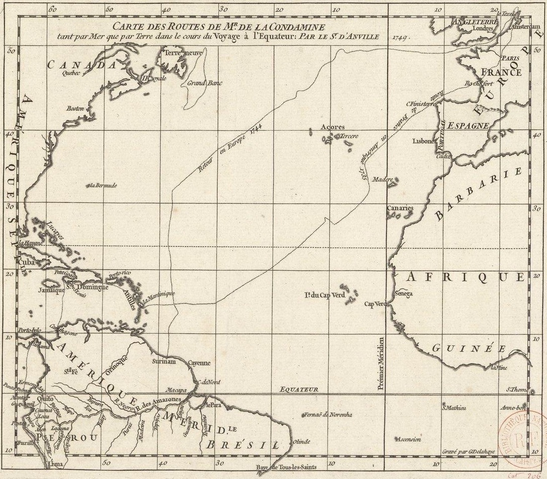 Carte relatant le voyage par mer et par terre de l'expédition de La Condamine au Pérou entre 1735 et 1744.